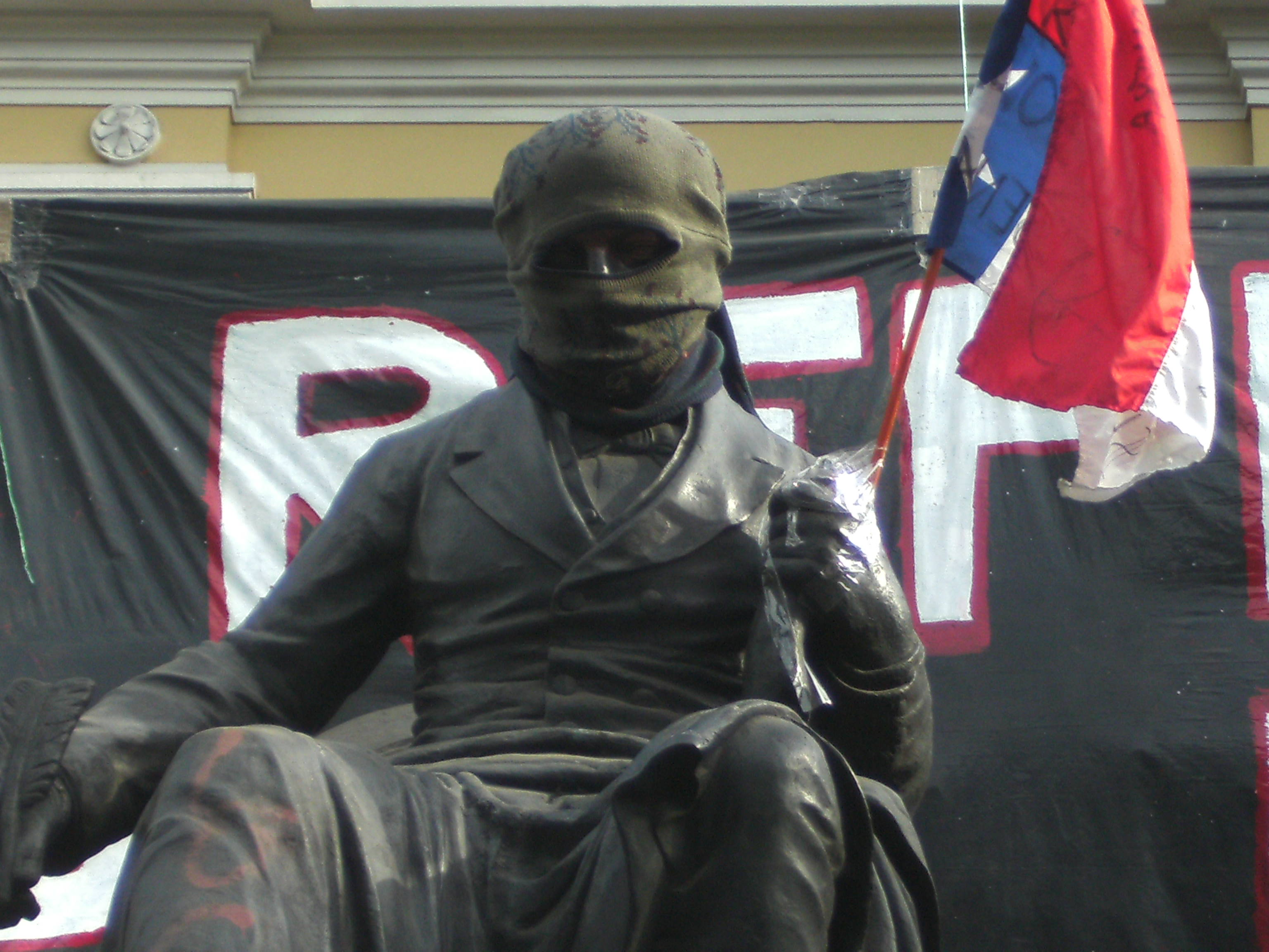 Estatua de Andres Bello encapuchada durante el conflicto estudiantil de 2011